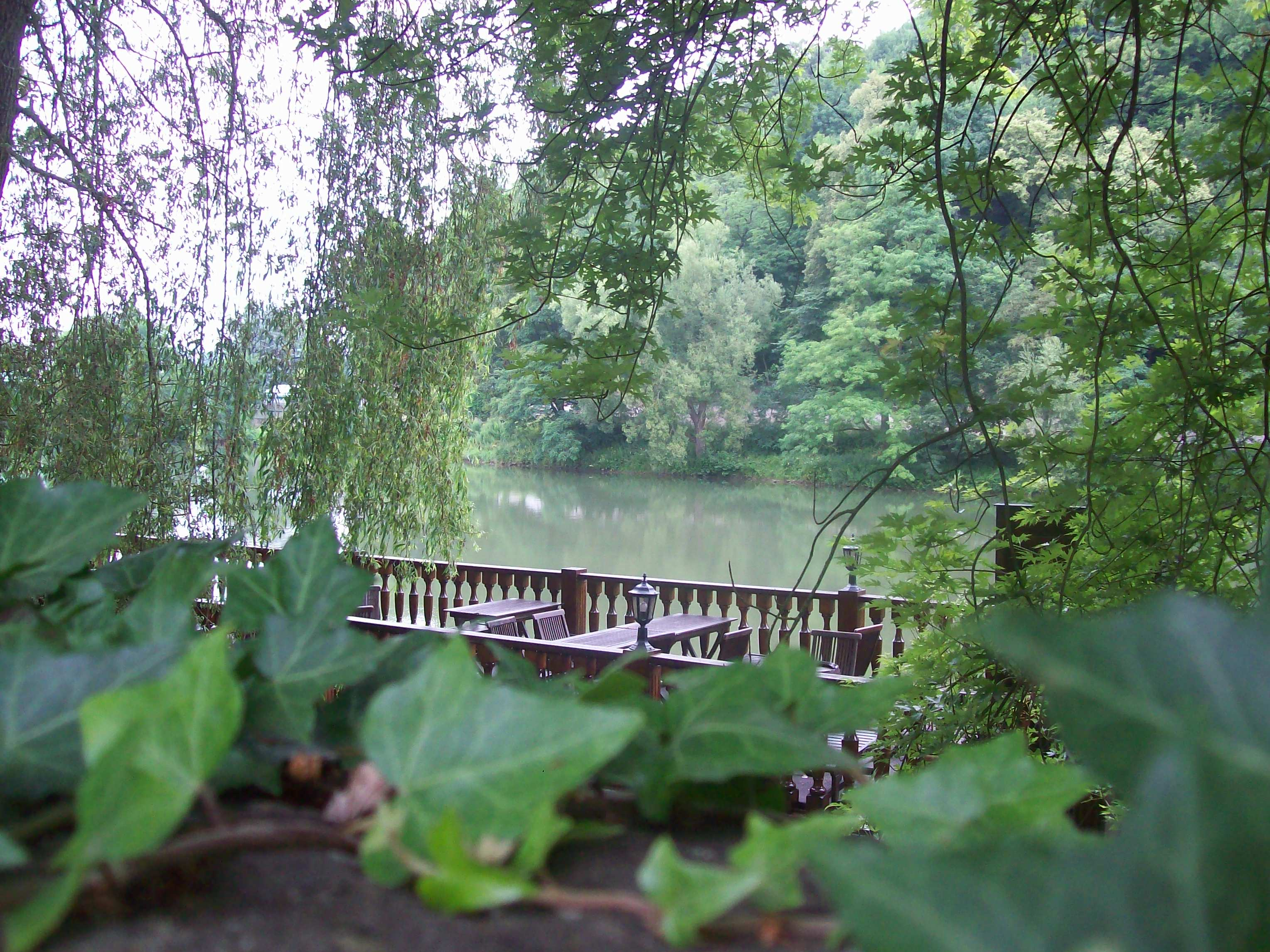 Ville: Charleville-Mézières Région: Champagne-Ardenne Pays: France